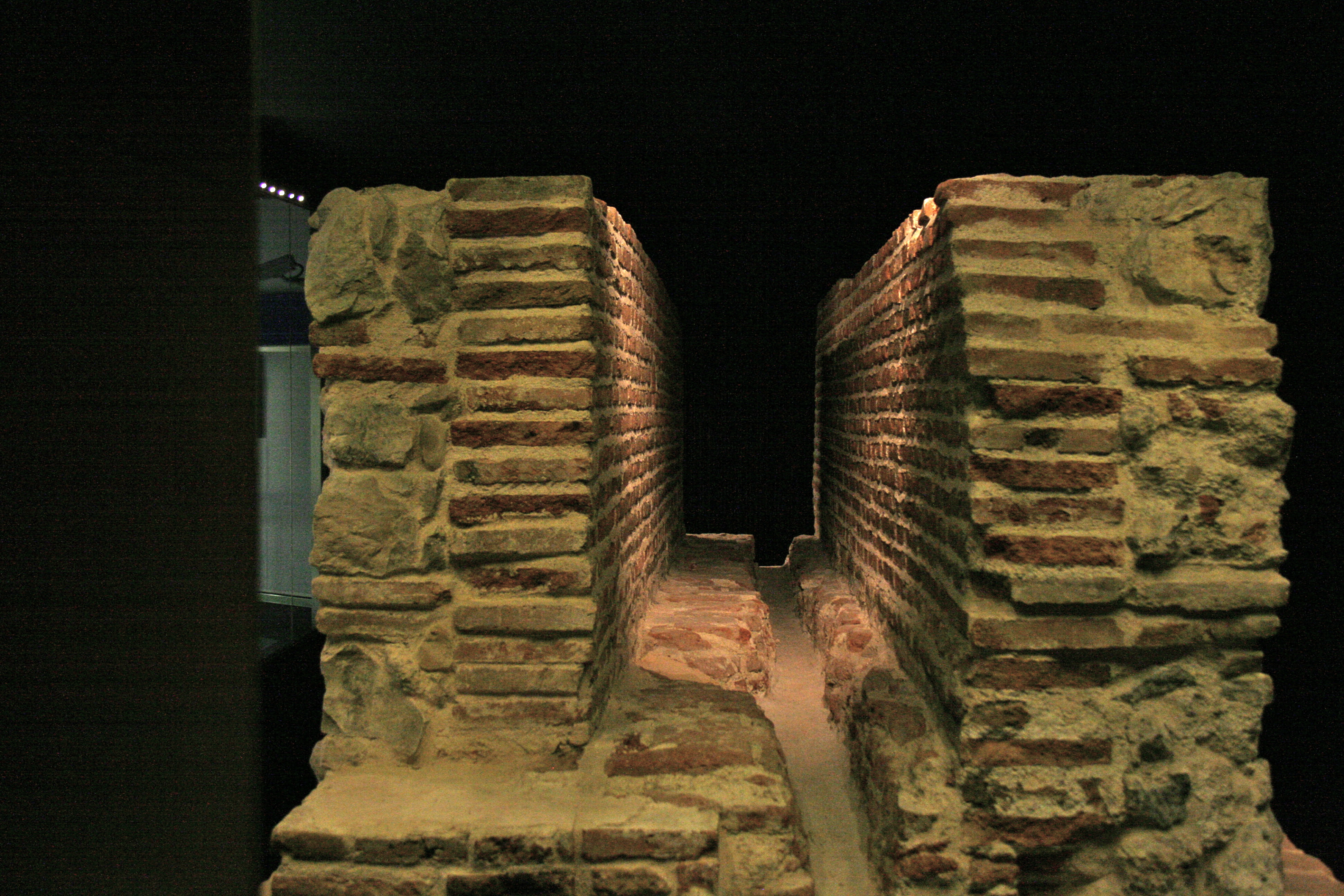 Sección del Viaje de Amaniel - Plaza de Isabel II (Madrid)